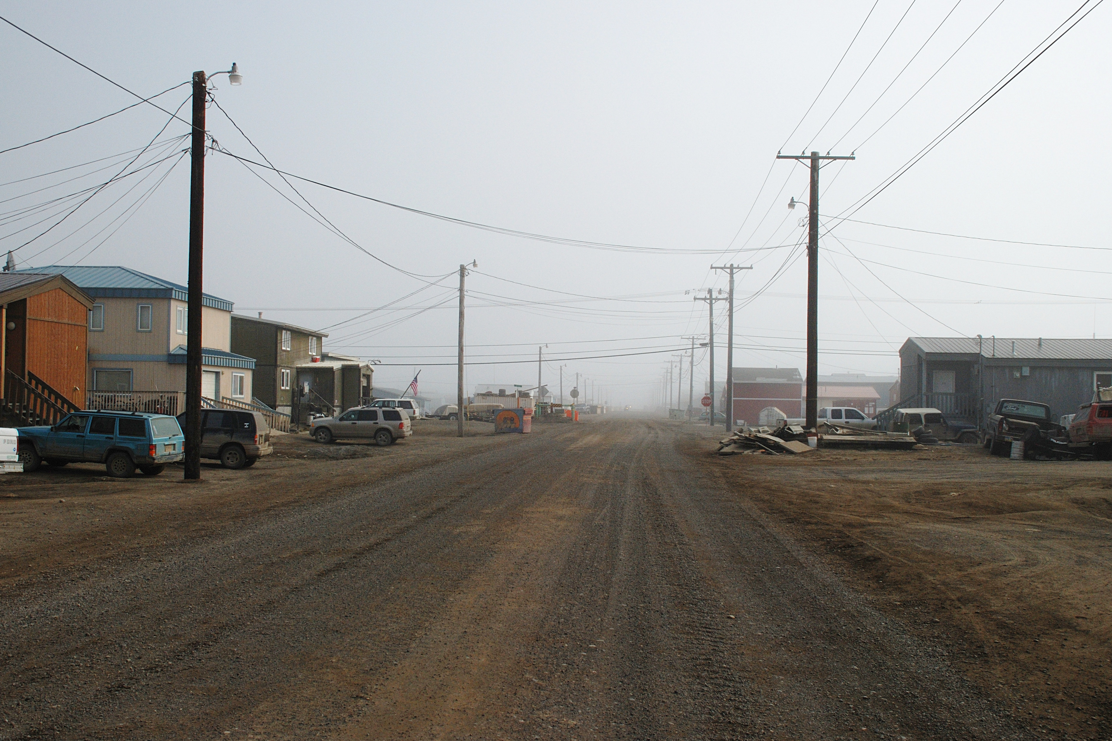 Barrow, Alaska